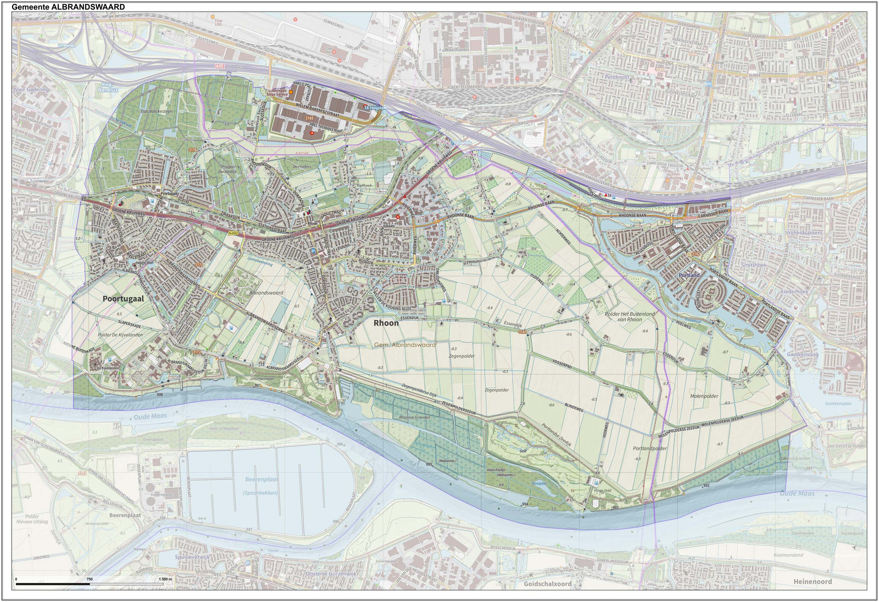 Topografische gemeentekaart. Resolutie: 400 pixels/km. Kaartbeeld samengesteld uit de open geodata van de Top10NL en Top25namen (Kadaster), Creative Commons-BY licentie. Gebouwvlakken uit open geodata BAG extract. Wegen uit de OpenStreetMap, OpenStreetMap community. Reliëfschaduw uit de Actuele Hoogtekaart AHN2. Samenstelling en kleurenschema: Jan-Willem van Aalst, met QGIS. Zie ook de Legenda.